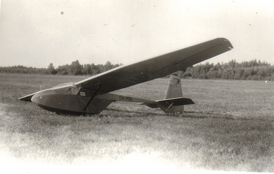 PIK-5c OH-PBI Vaasan lentoasemalla vuonna 1960.